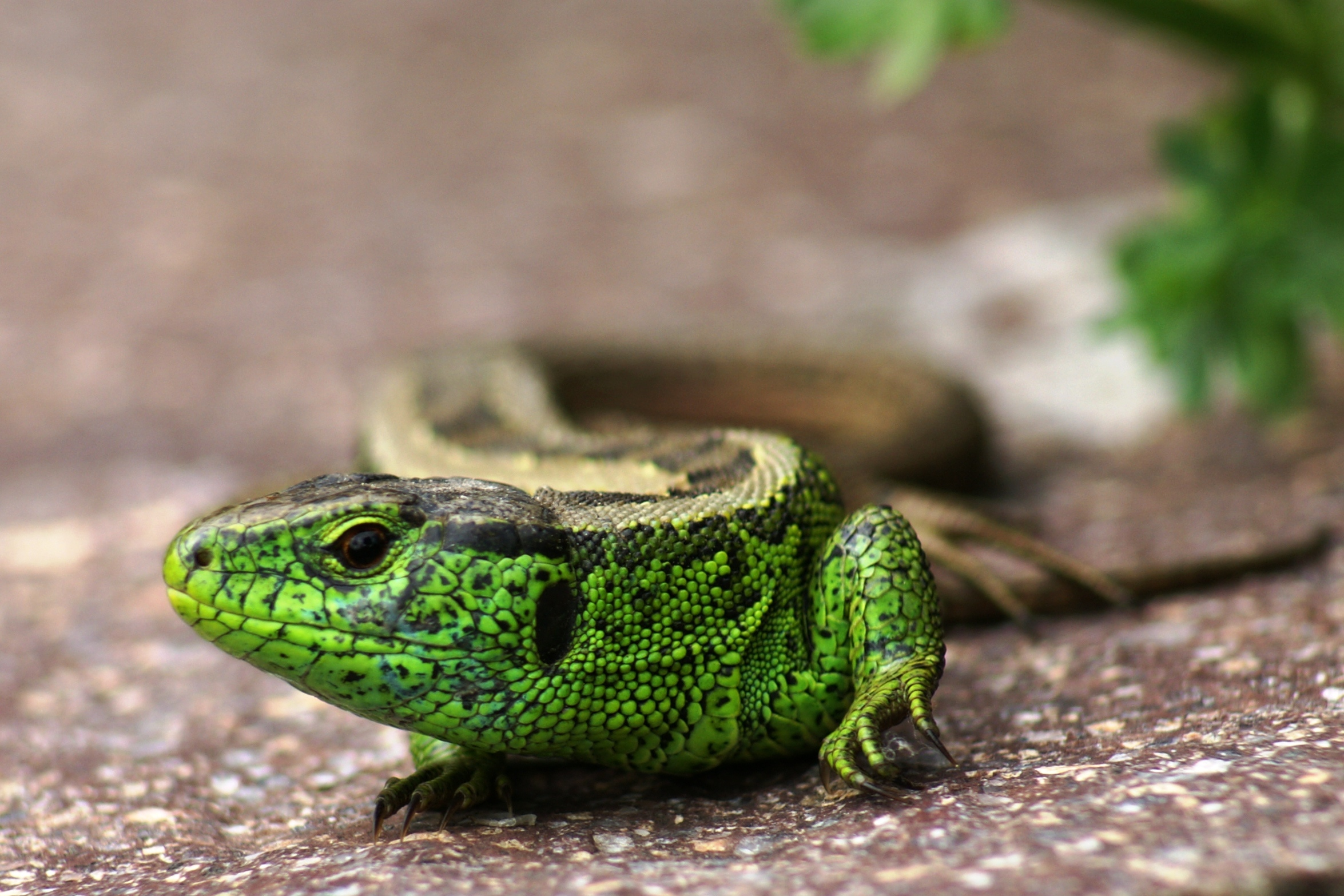 Zauneidechse, männlich (Lacerta agilis)